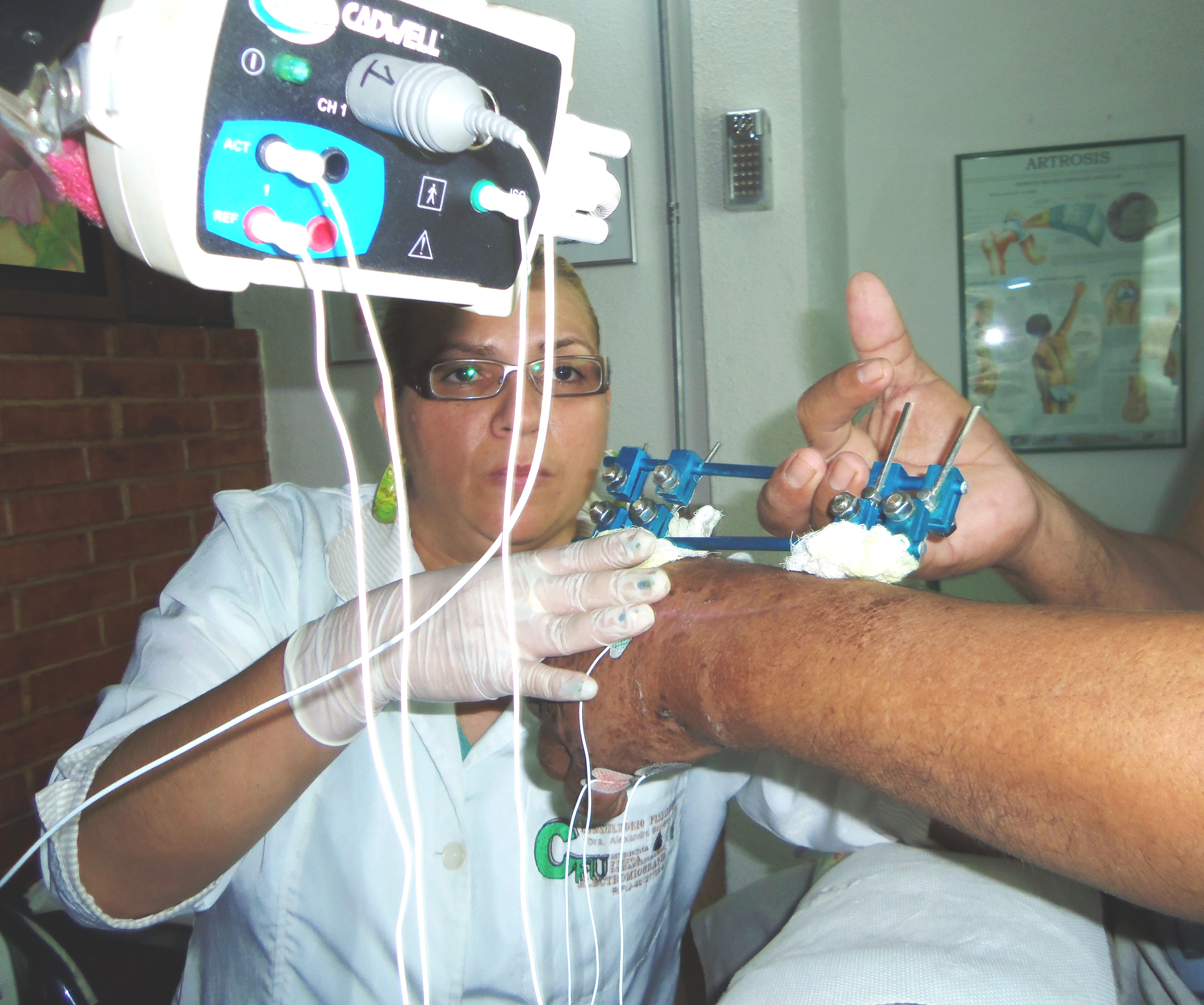 Dra.Alexandra Bandres evaluando posibles lesiones nerviosas mediante un estudio de Velocidad de conducción nerviosa y Electromiografia